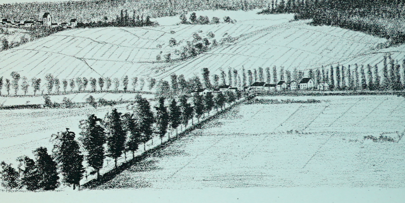 dessin de la côte sud de la Marne.